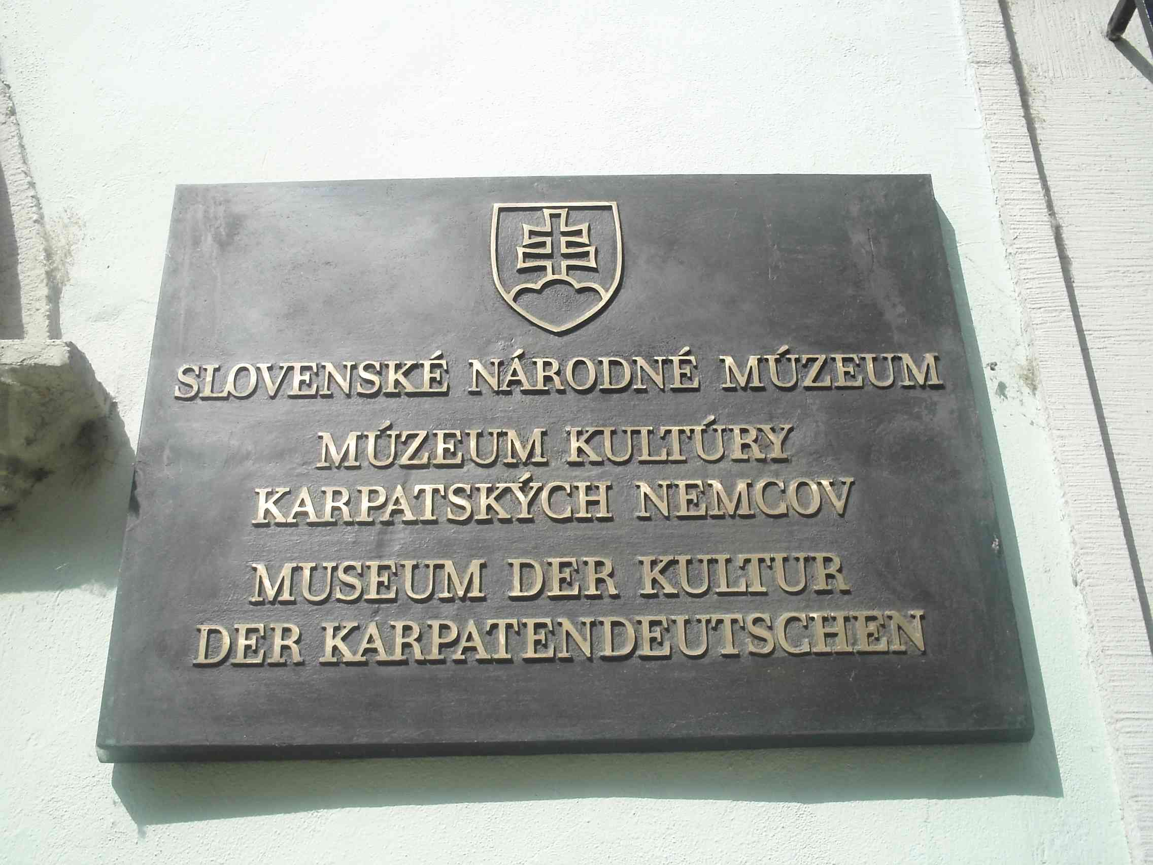 plaque du Musée des Allemands des Carpathes, Bratislava